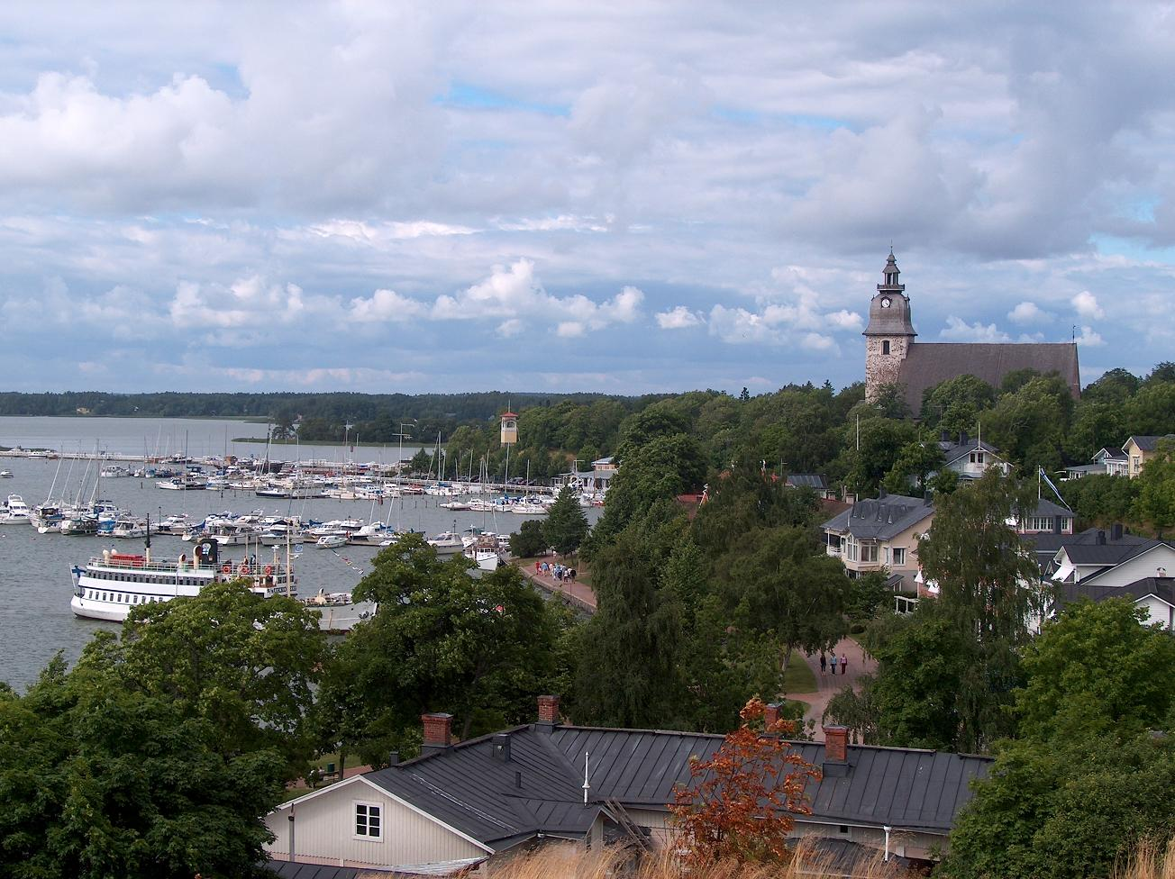 s/s Ukkopekka oldport of Naantali